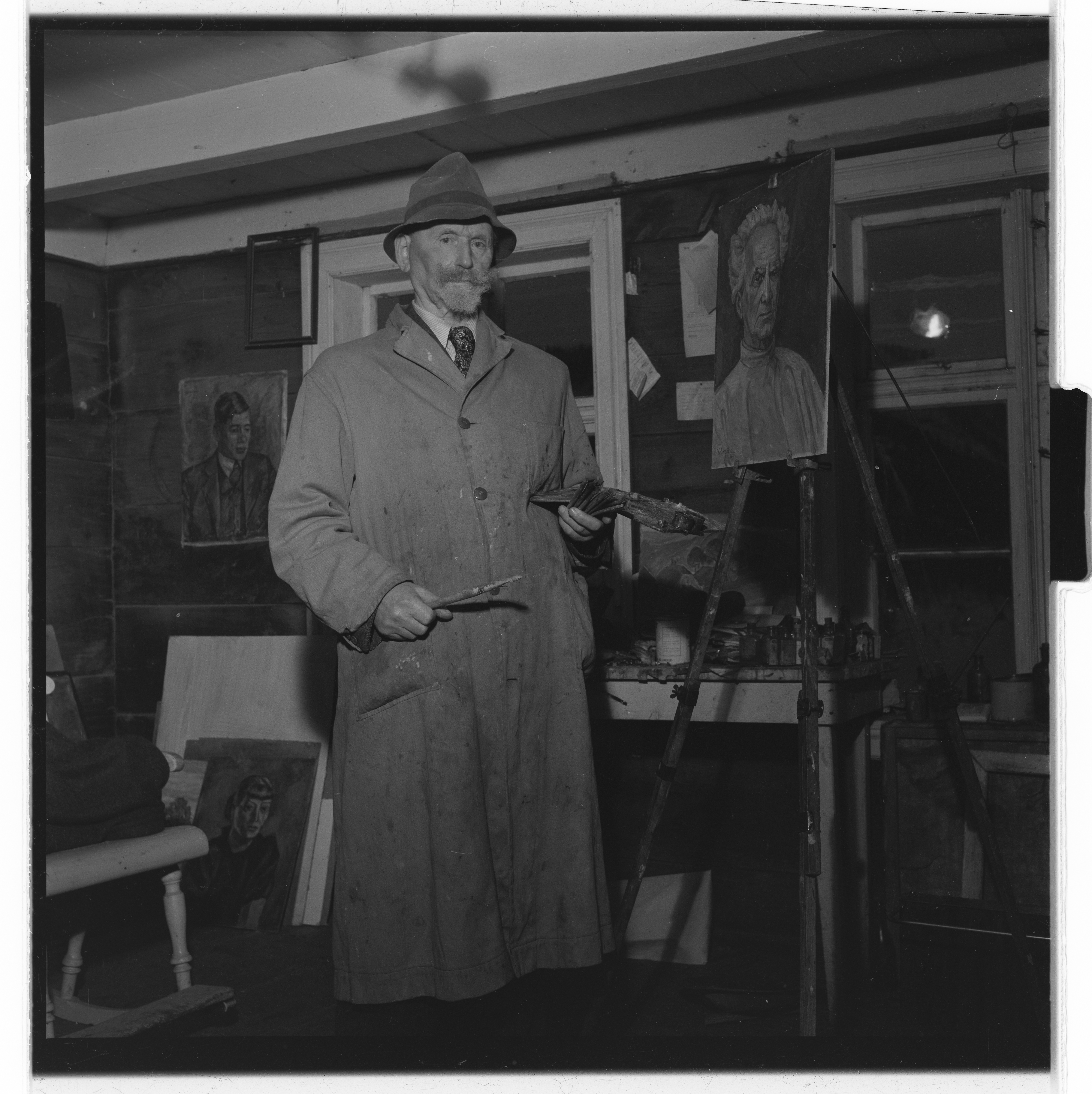 Bildet er hentet fra Arkivverket. Foto tatt i forbindelse med reportasje om malerne Karl og Oddvar Straume fra Ørstavik, Sunnmøre. NÅ nr. 3 Arkivinstitusjon : Riksarkivet Arkivnavn : Billedbladet NÅ Sted : Norge, Møre og Romsdal, Ukjent, Sunnmøre Emneord: Kunstnere, Malere Avbildet